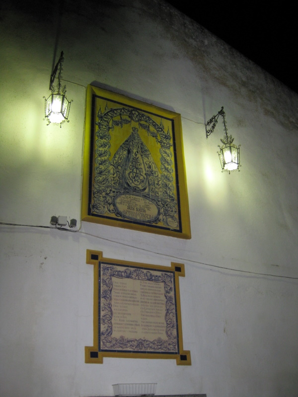 Virgen de Buensuceso, patrona del pueblo